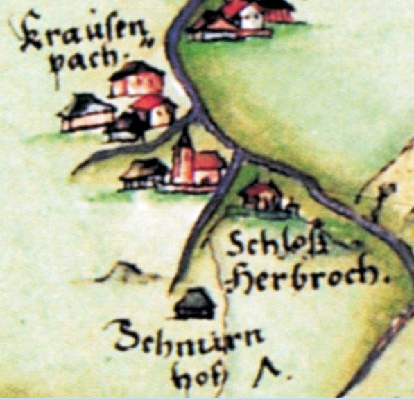 Ausschnitt der Pfinzing Karte von 1594 (Ursprung 1562) und stilisierter Ansicht Schloss Herbroch (Burgstall Unterschnorrhof)